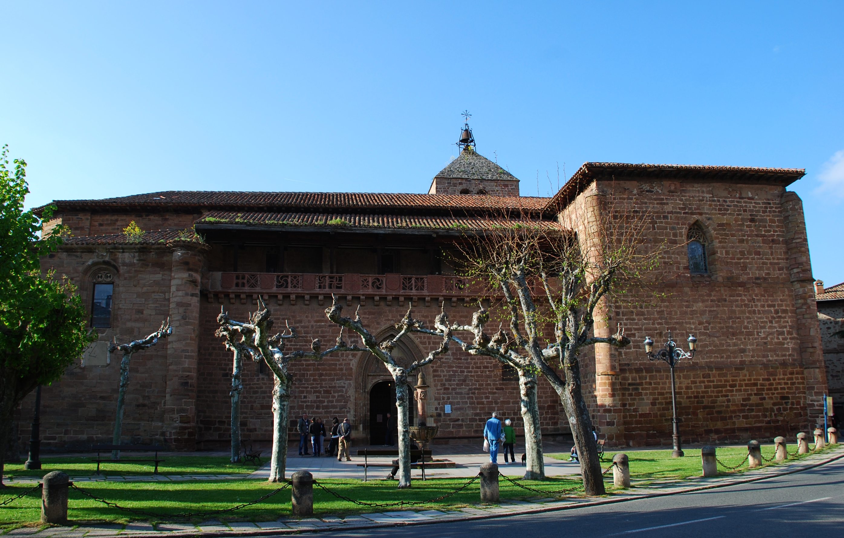 Iglesia de Santa María la Mayor - Ezcaray, La Rioja - España.